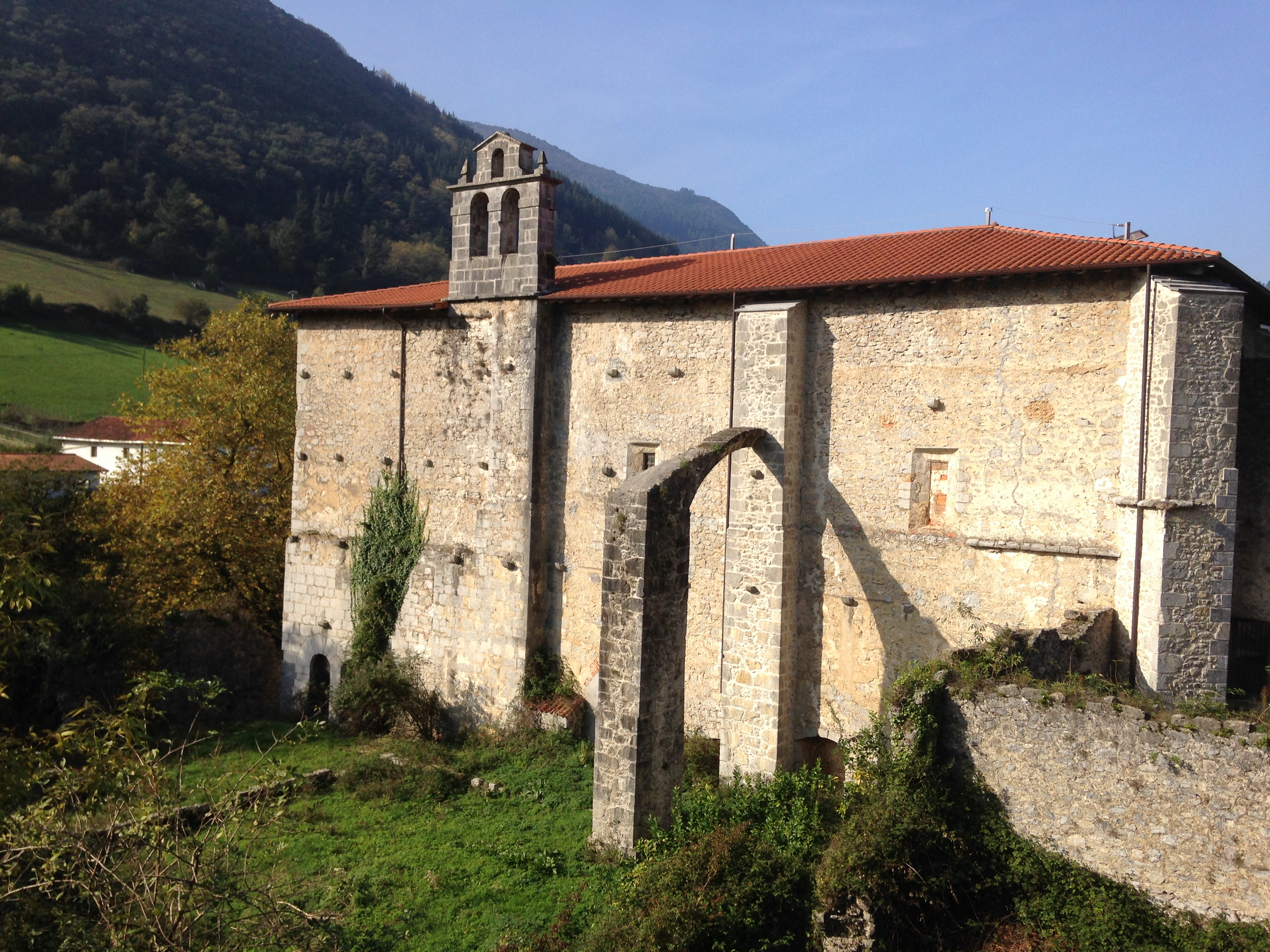 Vista general de la iglesia de Sasiola en Deba (Guipúzcoa) País Vasco (España)